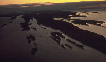 foto aerea de la Isle Royale